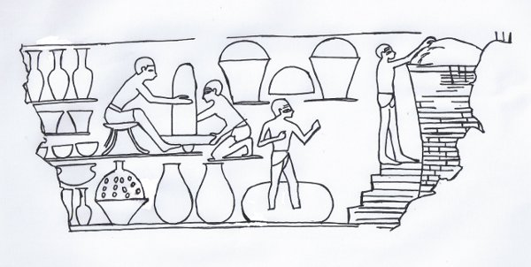 Darstellung der Keramikproduktion im Grab des Kenamun in Theben, Qurna, Altes Ägypten, 18. Dynastie